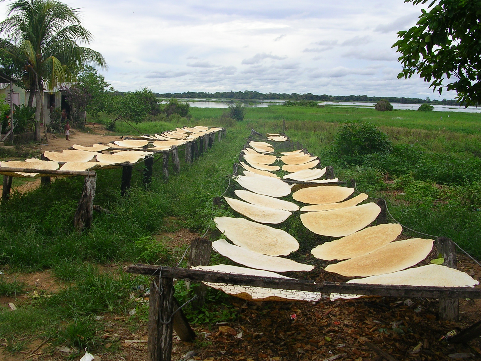 Despues que el casabe es elaborado, recién sacado del budare, es tendido al sol para el secado. Casabe burrero en san José de Buja, Monagas, Venezuela.